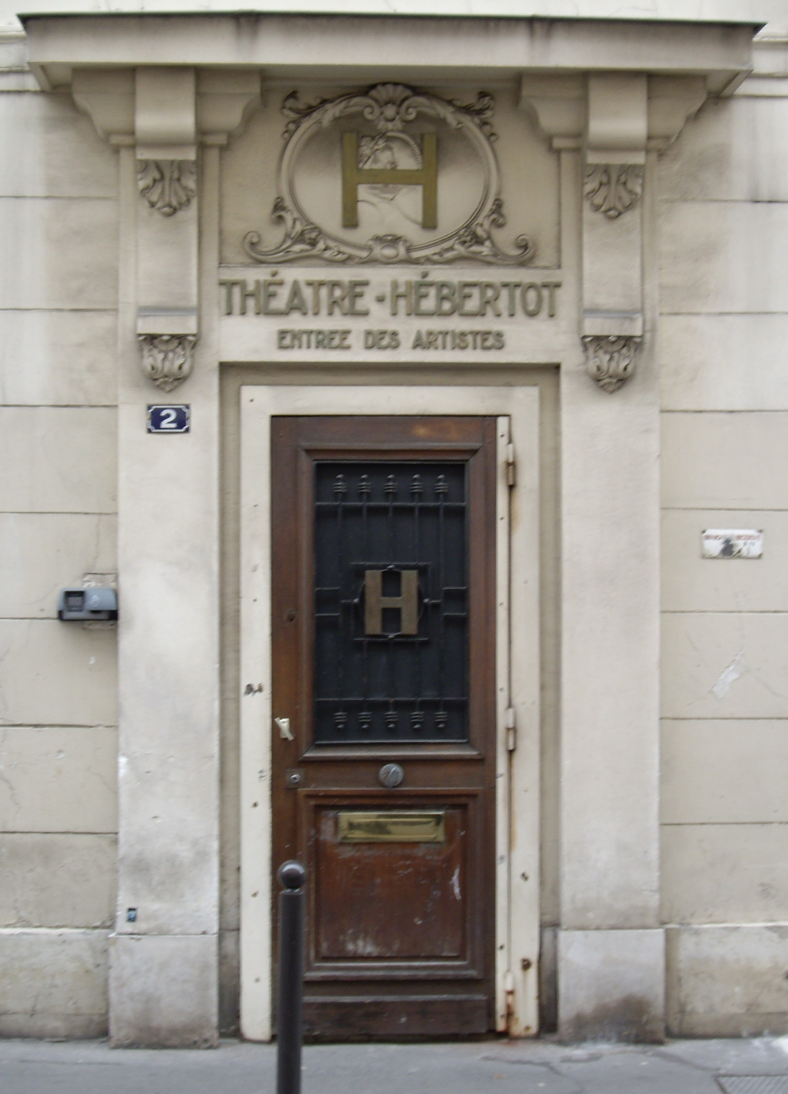 Entrée des artistes du théâtre Hébertot, 2 rue de Chéroy, Paris 17e